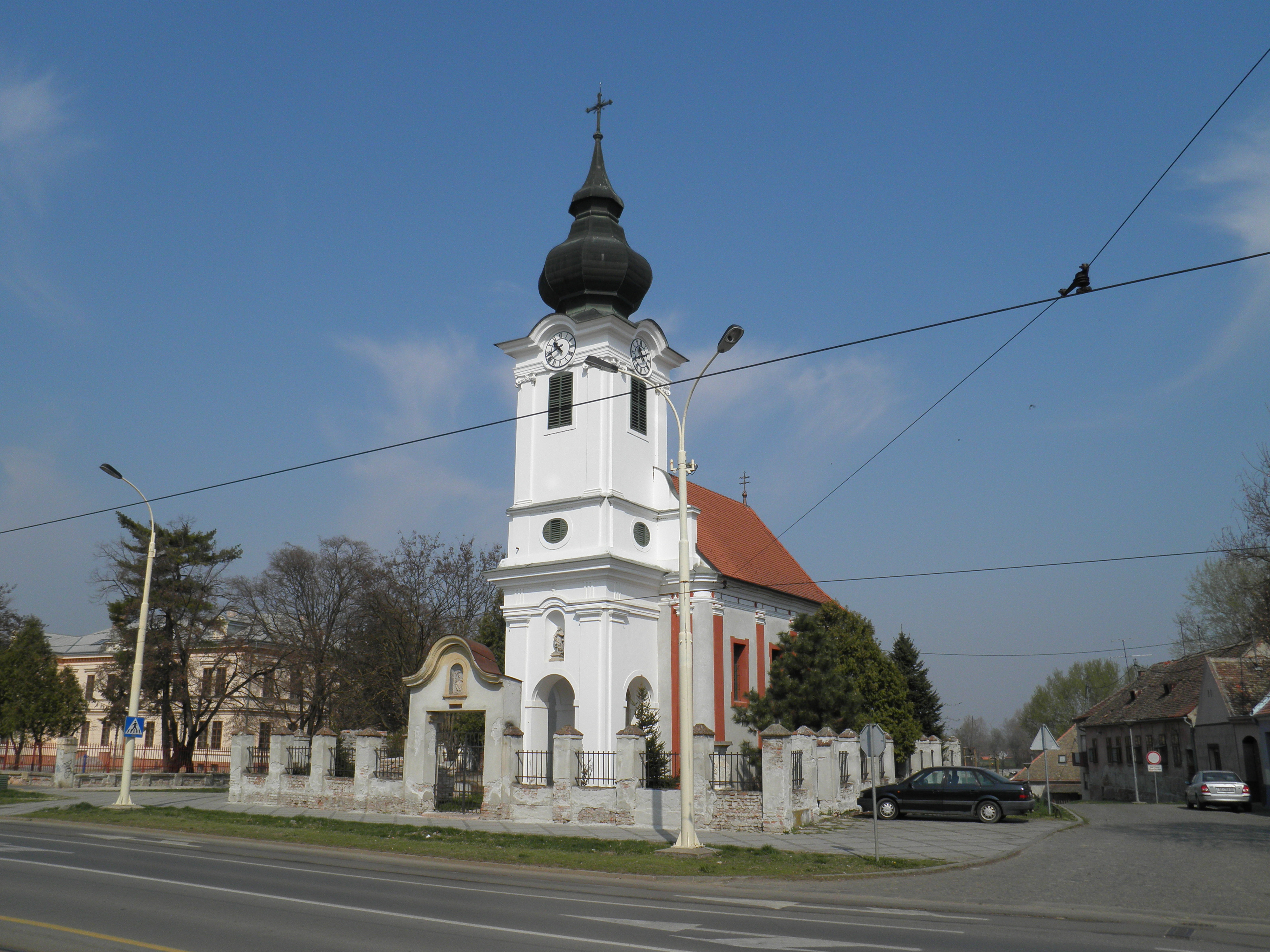 Kapelica Sv. Roka